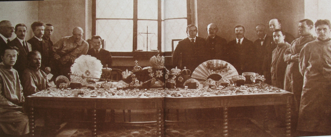 Знаменитое фото основной части российских коронных драгоценностей и драгоценностей императриц, сделанное советской комиссией в 1922 г. На столе представлены 13 диадем, бандо с пчелками, 4 короны, скипетр, держава и другие ценности, привезенные в Московский Кремль 1914 г. из Петрограда.